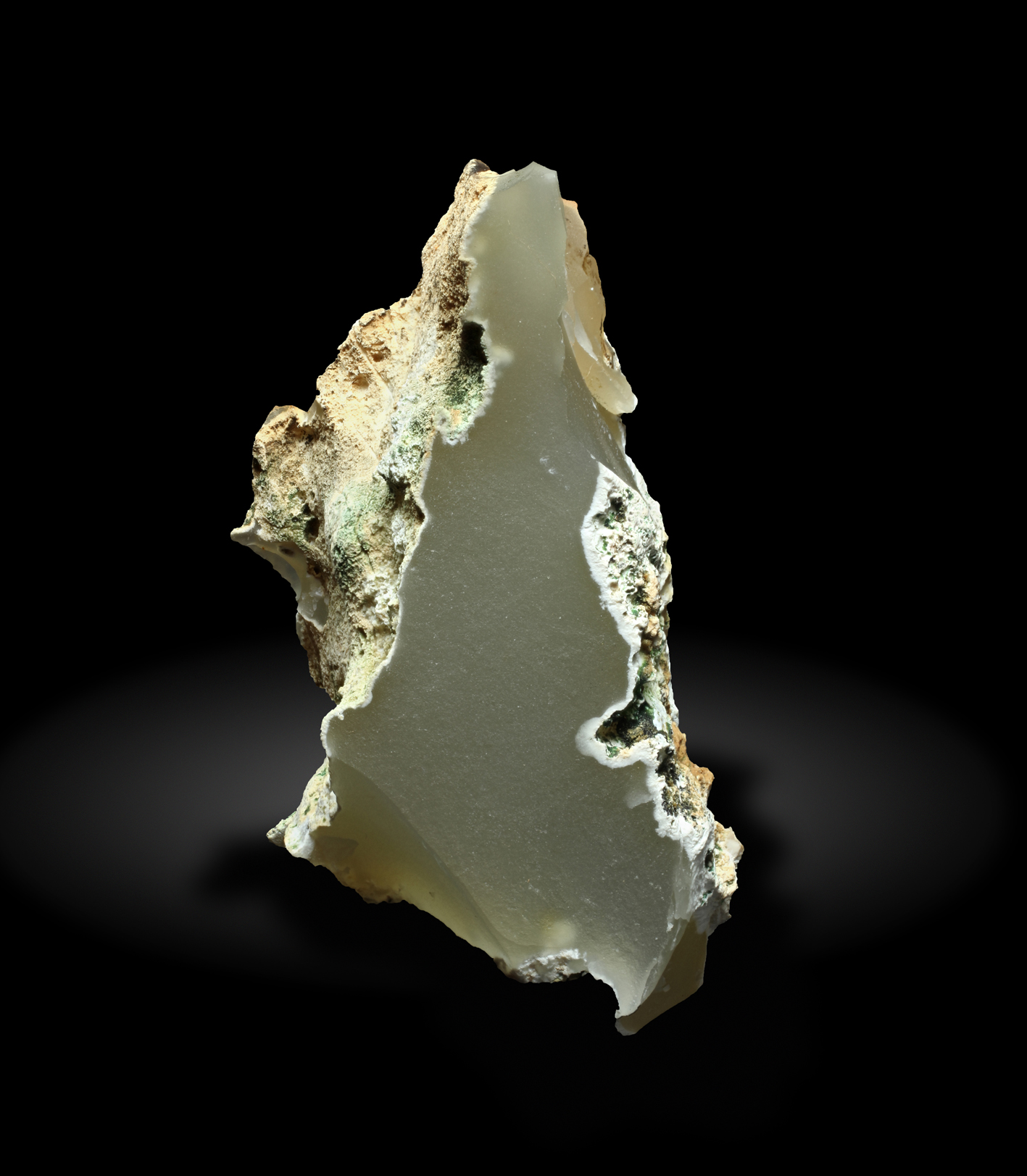 Ejemplar de moganita procedente del Barranco del Medio Almud, Mogán (Gran Canaria) España. Altura 5 cm. Colección Miguel Calvo. Foto Joaquim Callen.